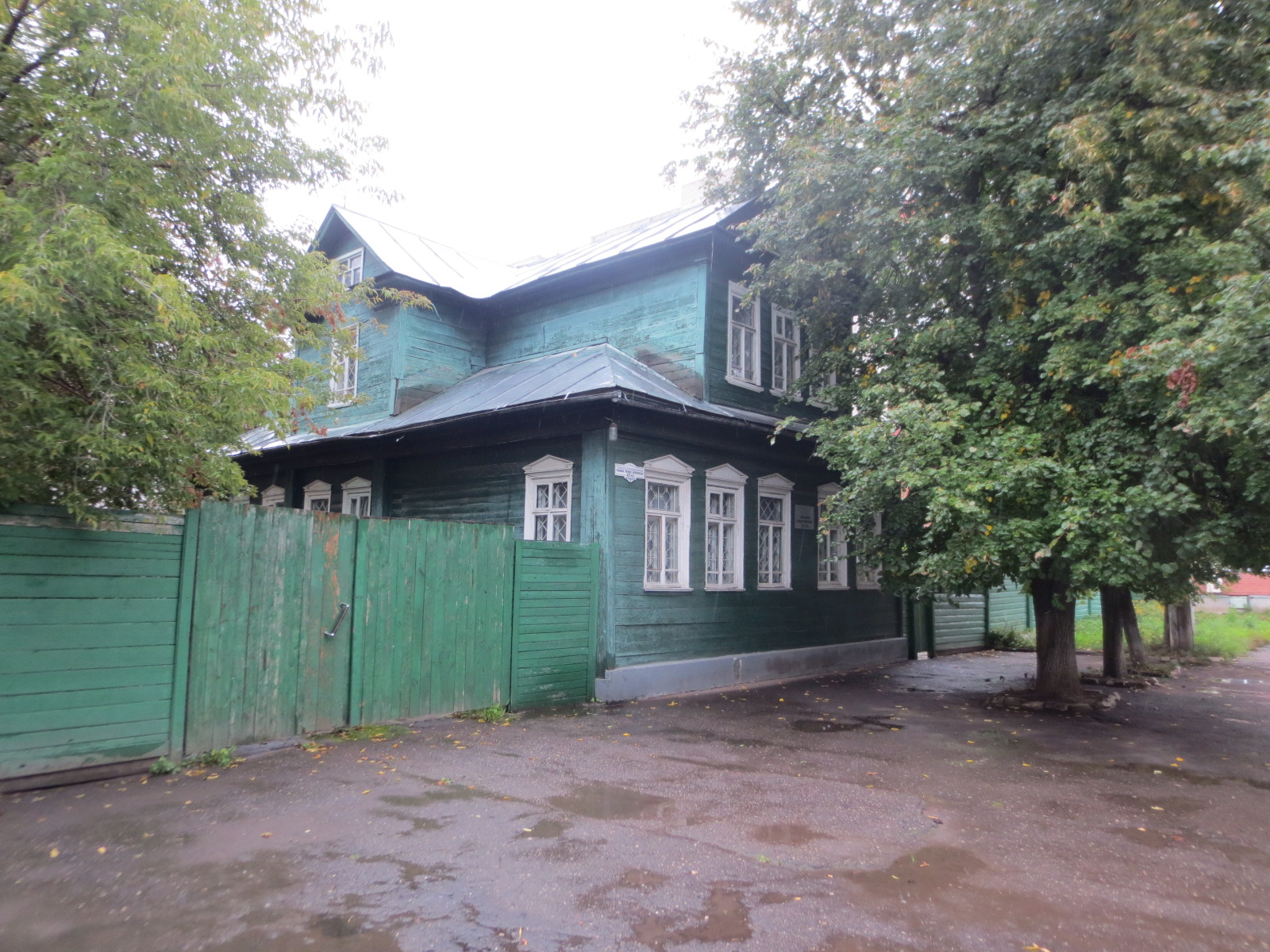 Дом, где родился и жил А.С.Бубнов и где в 1905-1907гг. находилась конспиративная квартира Иваново – Вознесенской организации РСДРП, в которой скрывался М.В.Фрунзе: улица 3 Интернационала, 45/43, Иваново, Ивановская область